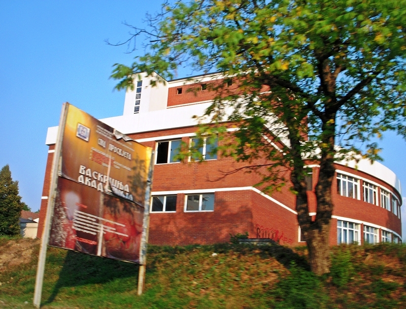 Narodno pozorište